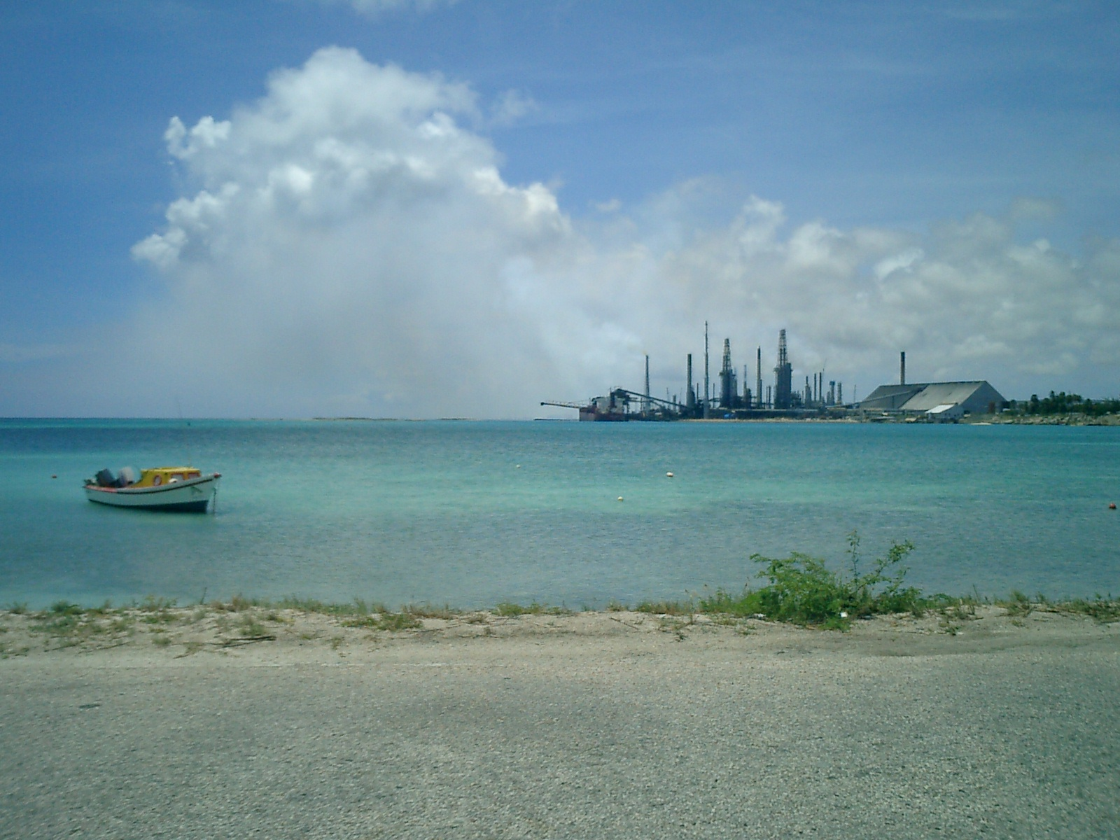 Sero Colorado, Seroe Colorado, Aruba